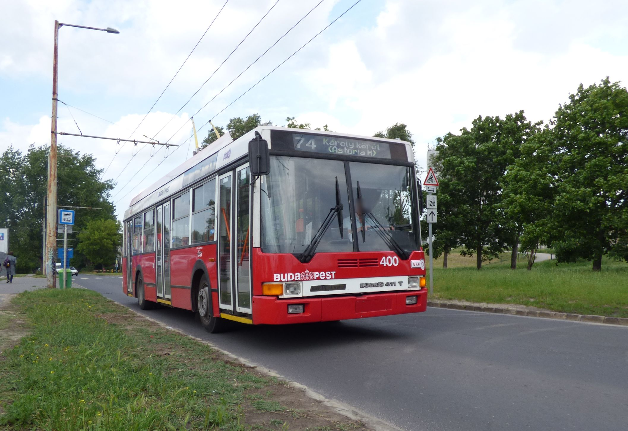 74-es jelzésű Ikarus 411T trolibusz a Szőnyi úton